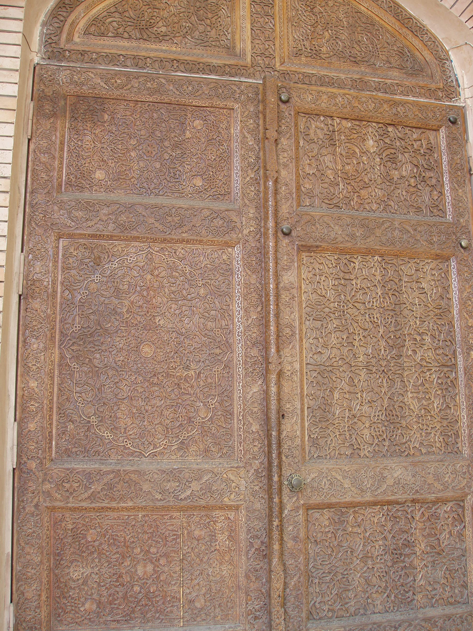 Porte en bois sculptée. Tachkent, Ouzbékistan